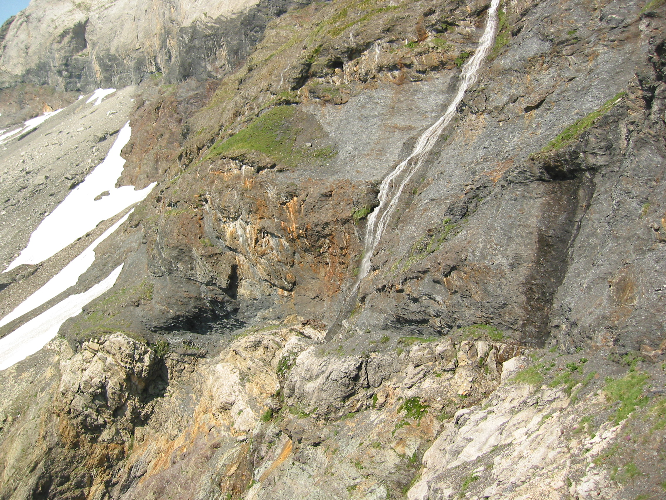 Chemin des mines dans la traversée du cirque de Barrosa, courant sur la couverture en calcaire crétacé blanc du socle, au pied de la couche d'ampélite, au niveau du plan de chevauchement, coupé par une cascade.